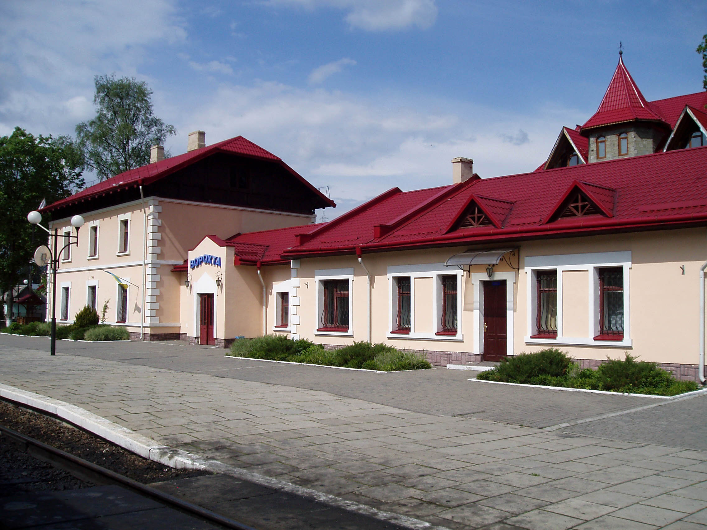 Залізнична станція у Ворохті.